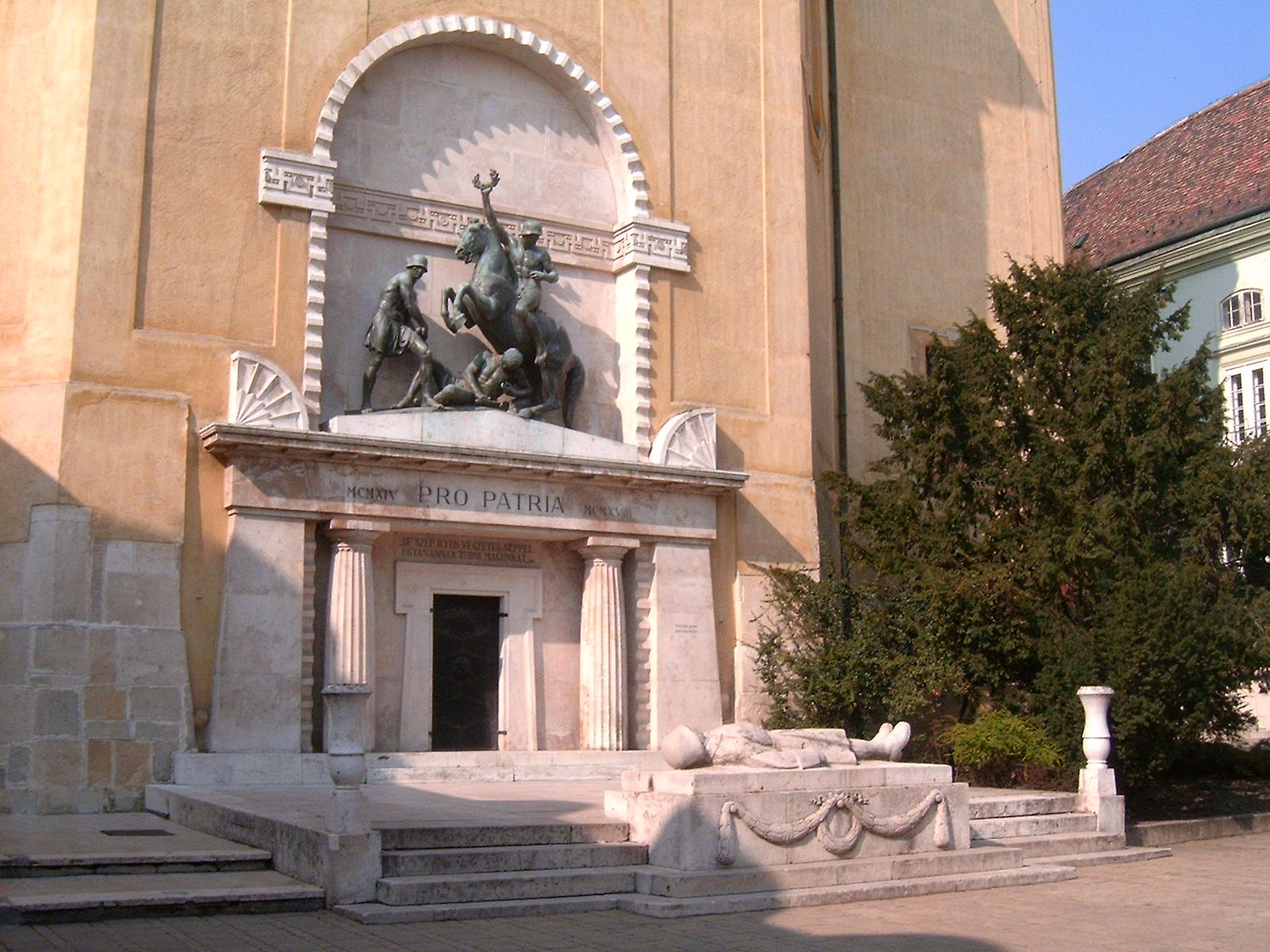 Pásztor János (1881-1945) – Hikisch Rezső (1876-1934): Hősi emlékmű, Székesfehérvár. Az emlékmű a Szent István Székesegyház kriptájának kapudíszéül szolgál. A bronz szoborcsoport 1929-ben került elhelyezésre, a fekvő katona szobra 1939-ben. Az utóbbi a hatvanas évektől 1989-ig más helyen állt.